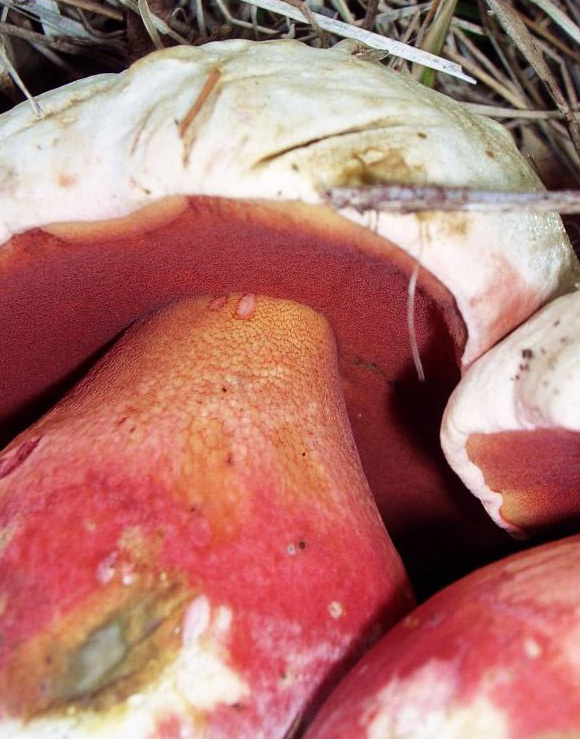 B.satanas - Dettaglio di pori e reticolo - Lajatico (PI) - 10/2006